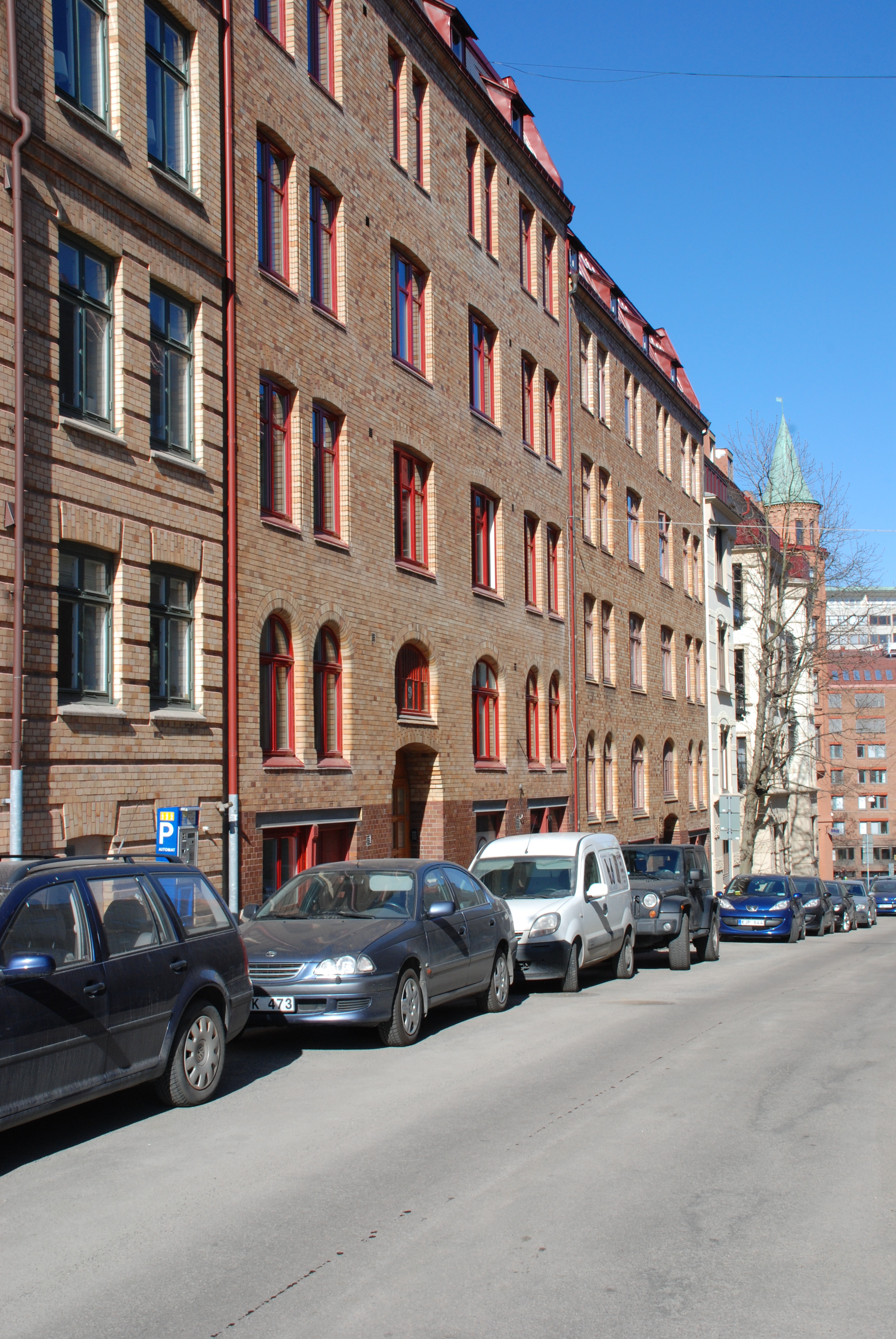 Kungshöjdsgatan 11-7 i Göteborg.